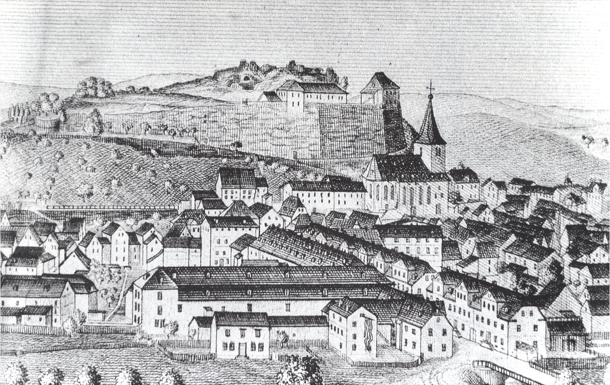 Dillenburg, 1840, Stahlstich auf Papier · schwarz-weiß